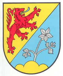 Wappen von Niederalben